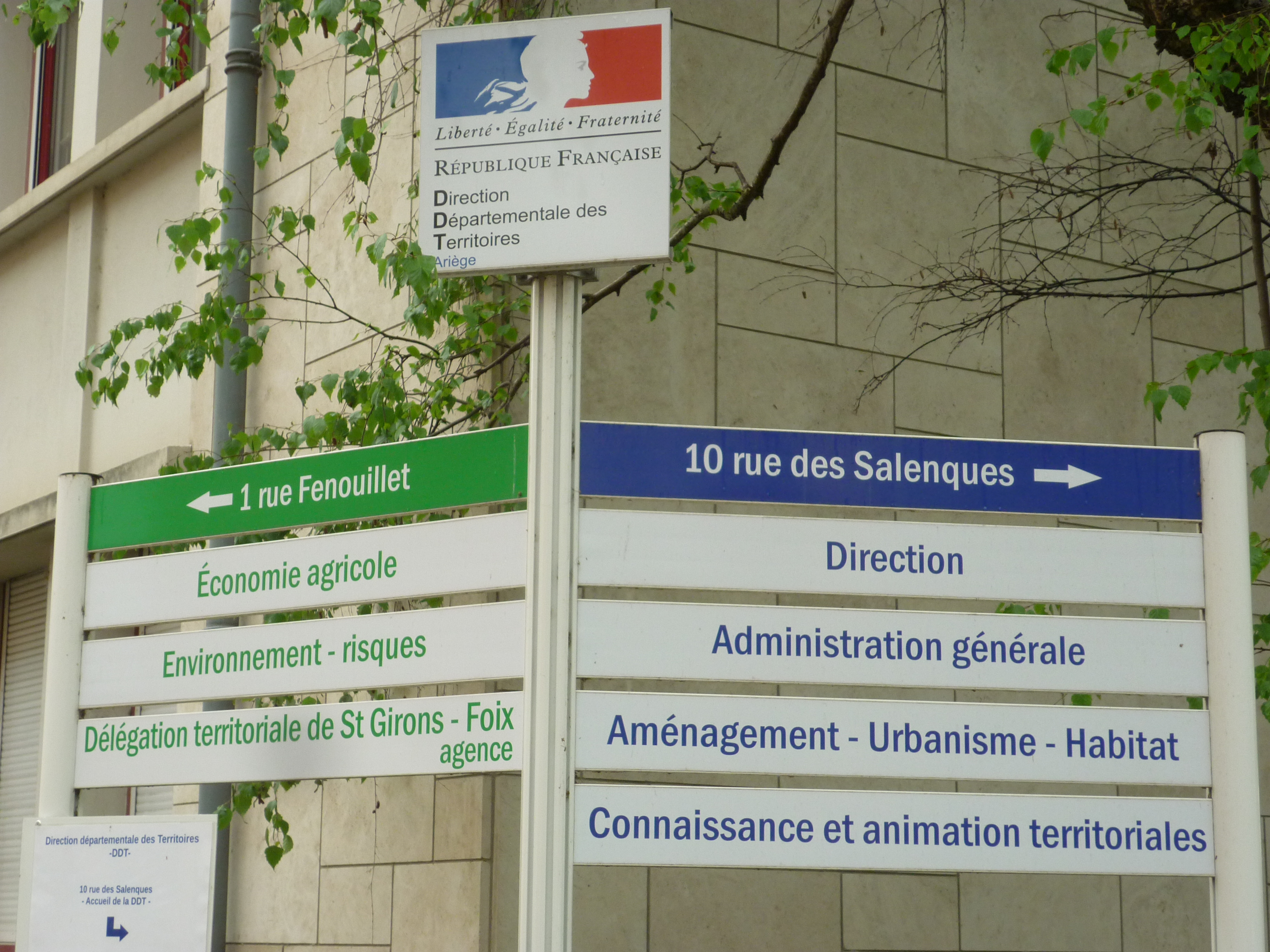 Service public en France, administration de l'Etat en département, panneau indicateur des services d'une direction départementale des territoires, Ariège